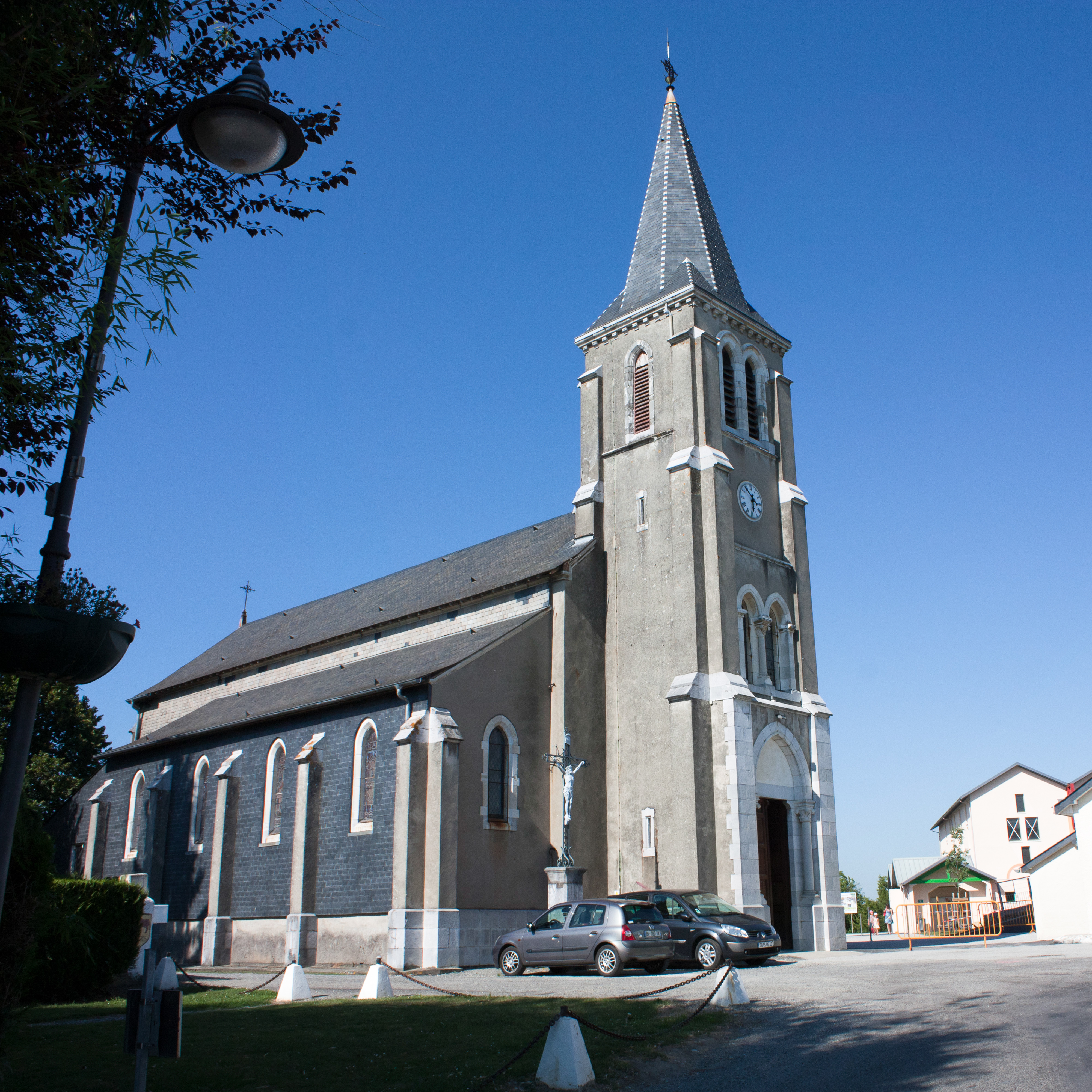 Eglise paroissiale Saint-Pierre (1870)